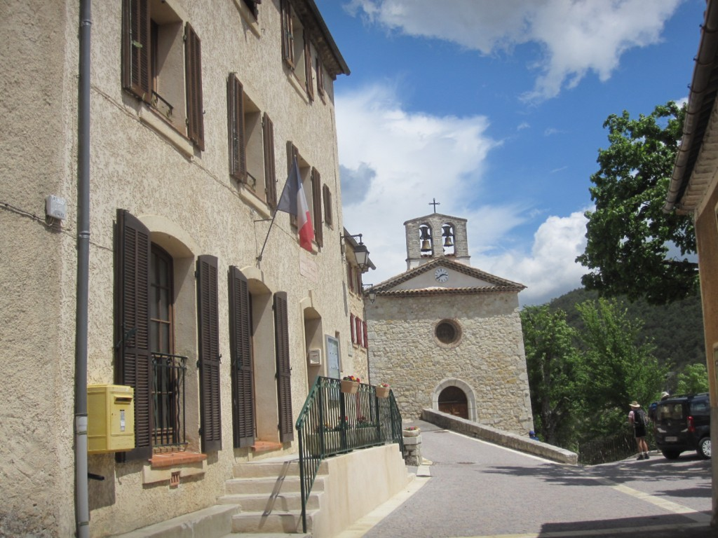 Maire et église de La Martre (Var)